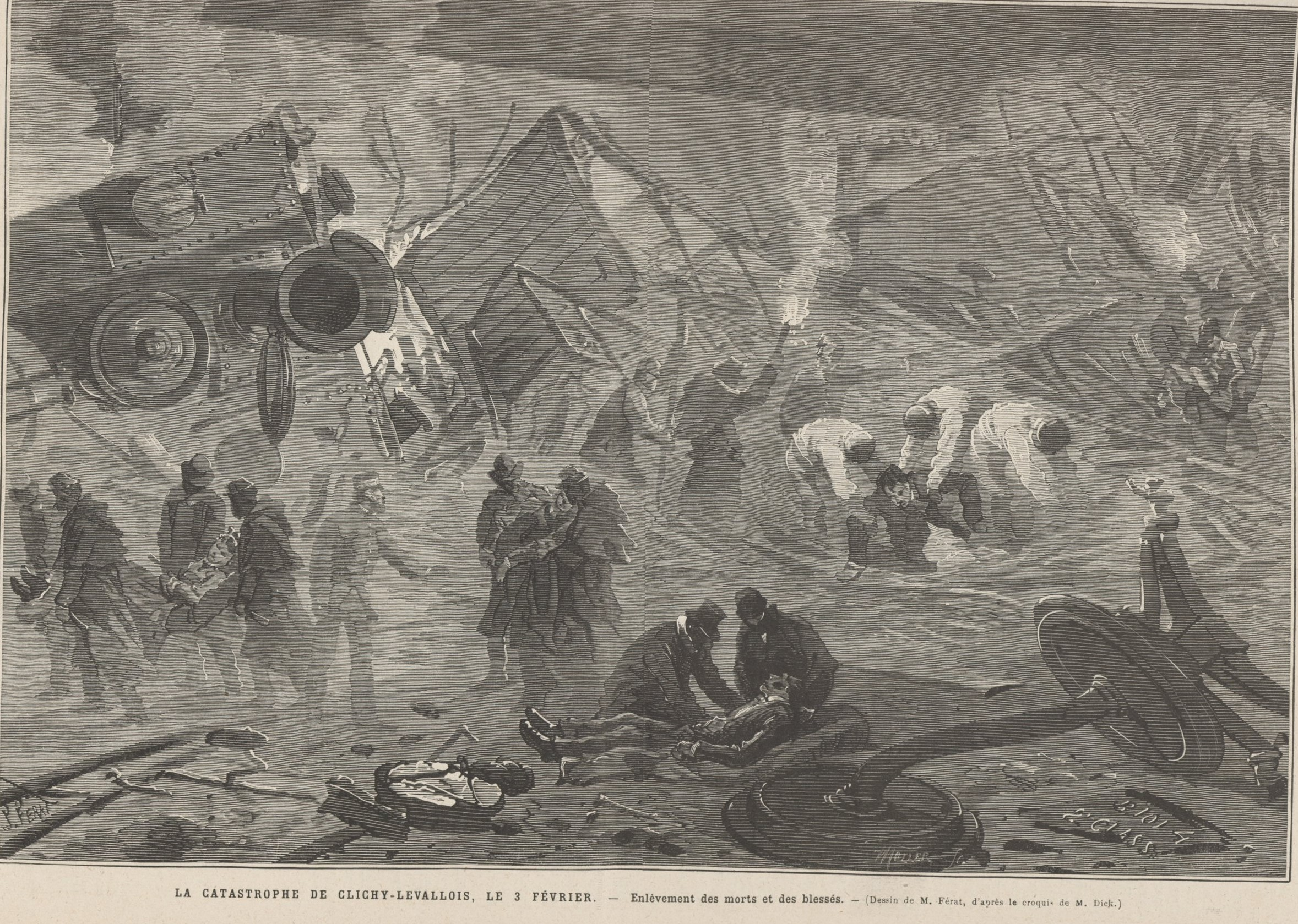 La catastrophe de Clichy-Levallois du 2 février 1880 vue par le dessinateur du Monde illustré du 14 février 1880.